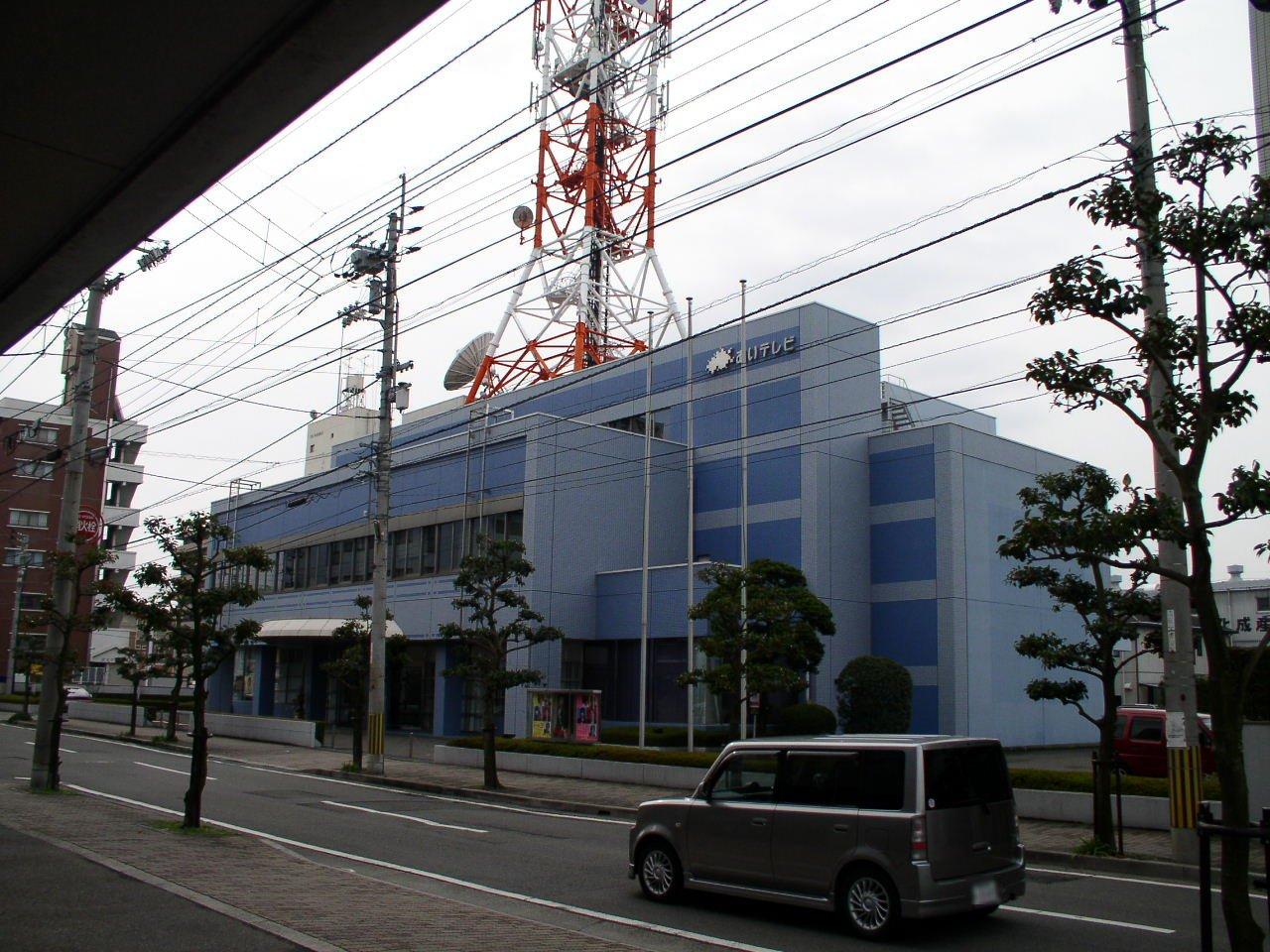 あいテレビ本社屋。所在地は、愛媛県松山市竹原町。